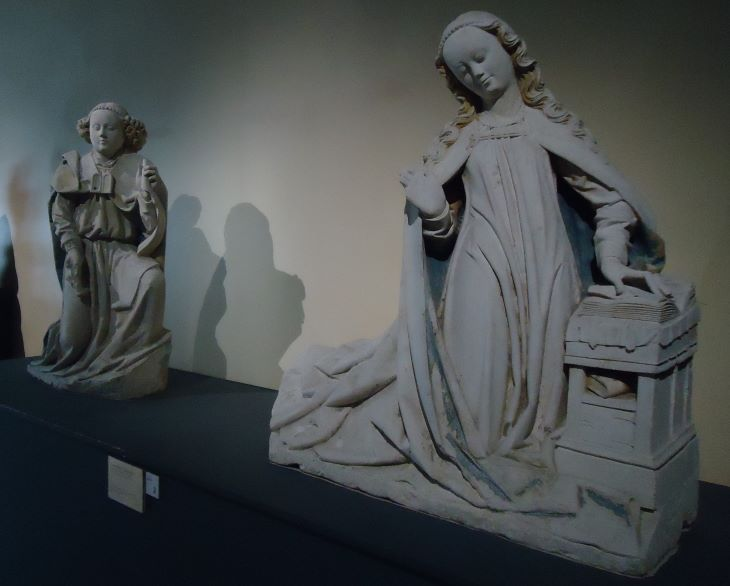 Ange et Vierge de l'Annonciation de Bois-Heroult